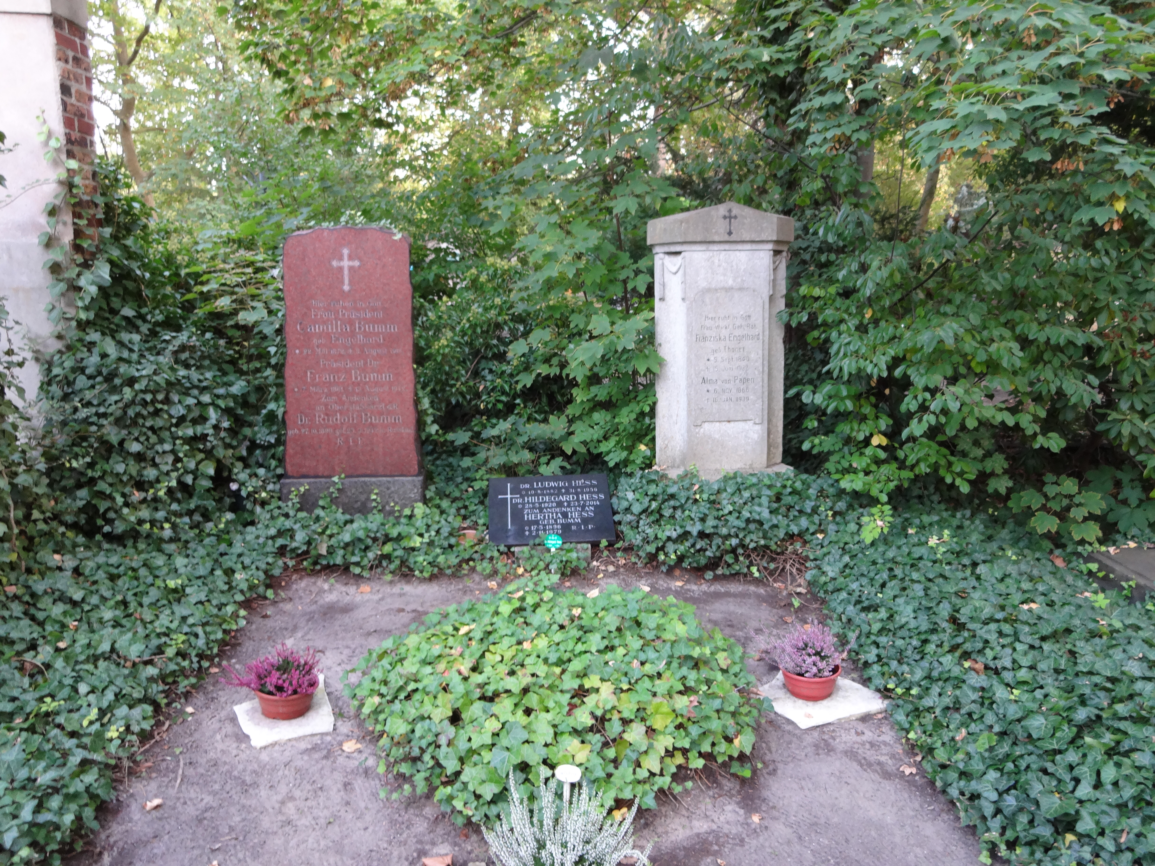 Grab von Franz Bumm (Präsident des Reichsgesundheitsamtes) auf dem Alten Domfriedhof der St.-Hedwigsgemeinde in der Liesenstraße in Berlin